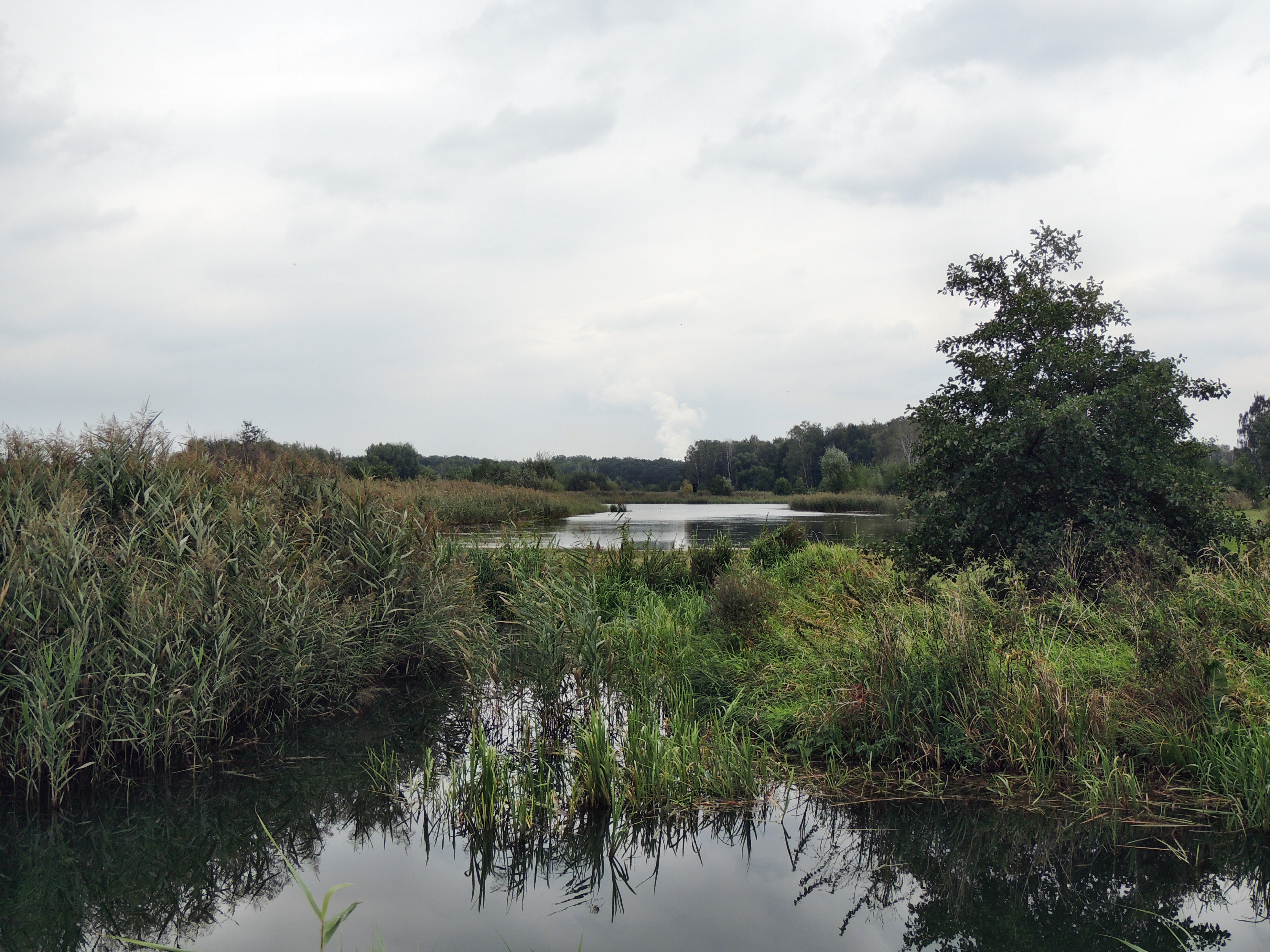 Spreeauen-Teiche, Cottbus-Sielow, Brandenburg, Deutschland.